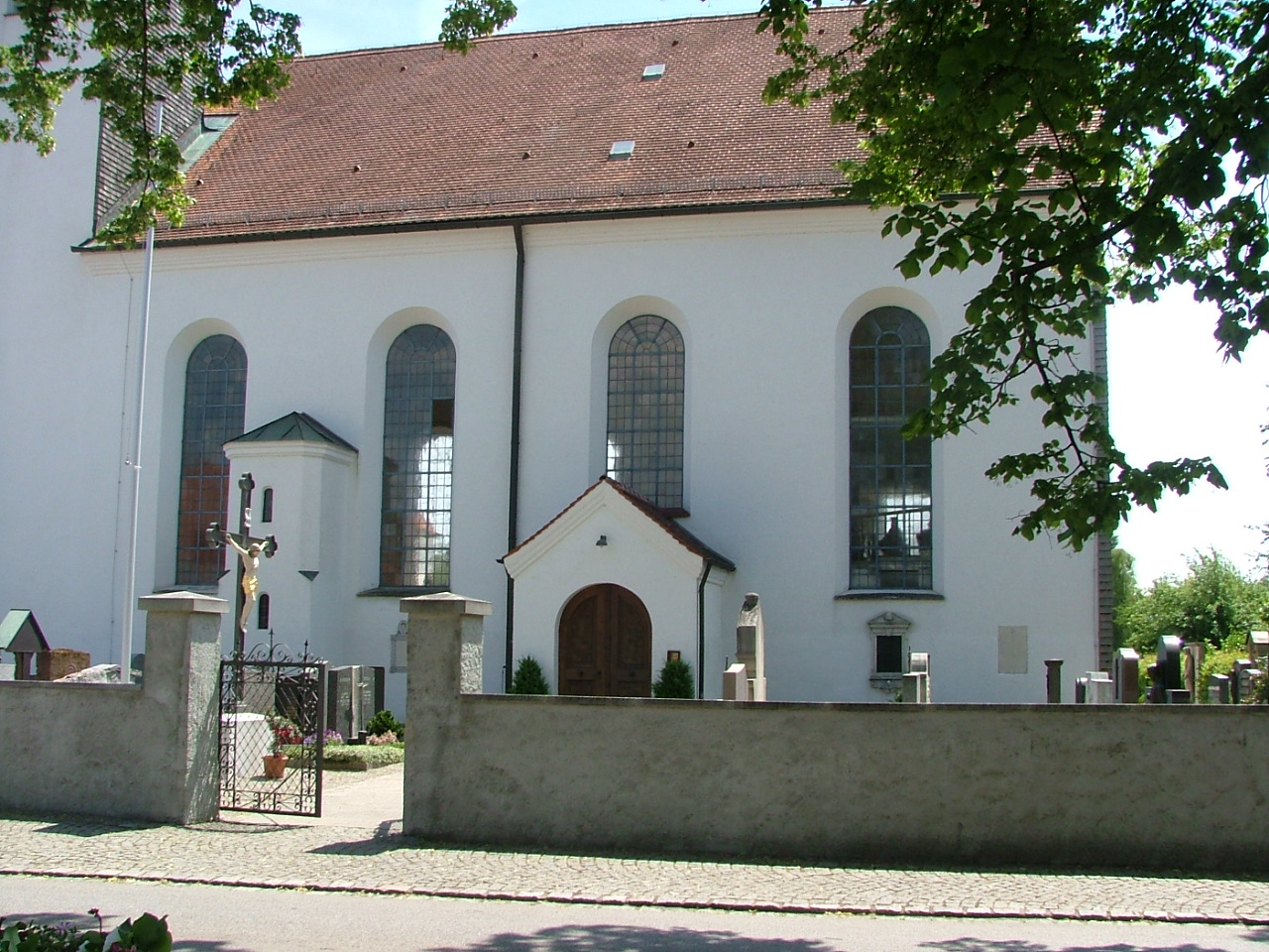 Aitrang, Friedhofsmauer und Langhaus der kath. Pfarrkirche St. Ulrich gegen Süden.